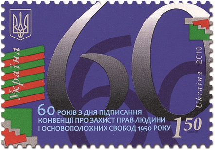 Timbre ukrainien : « 60 ans de la signature de la Convention européenne des droits de l'homme 1950 ».